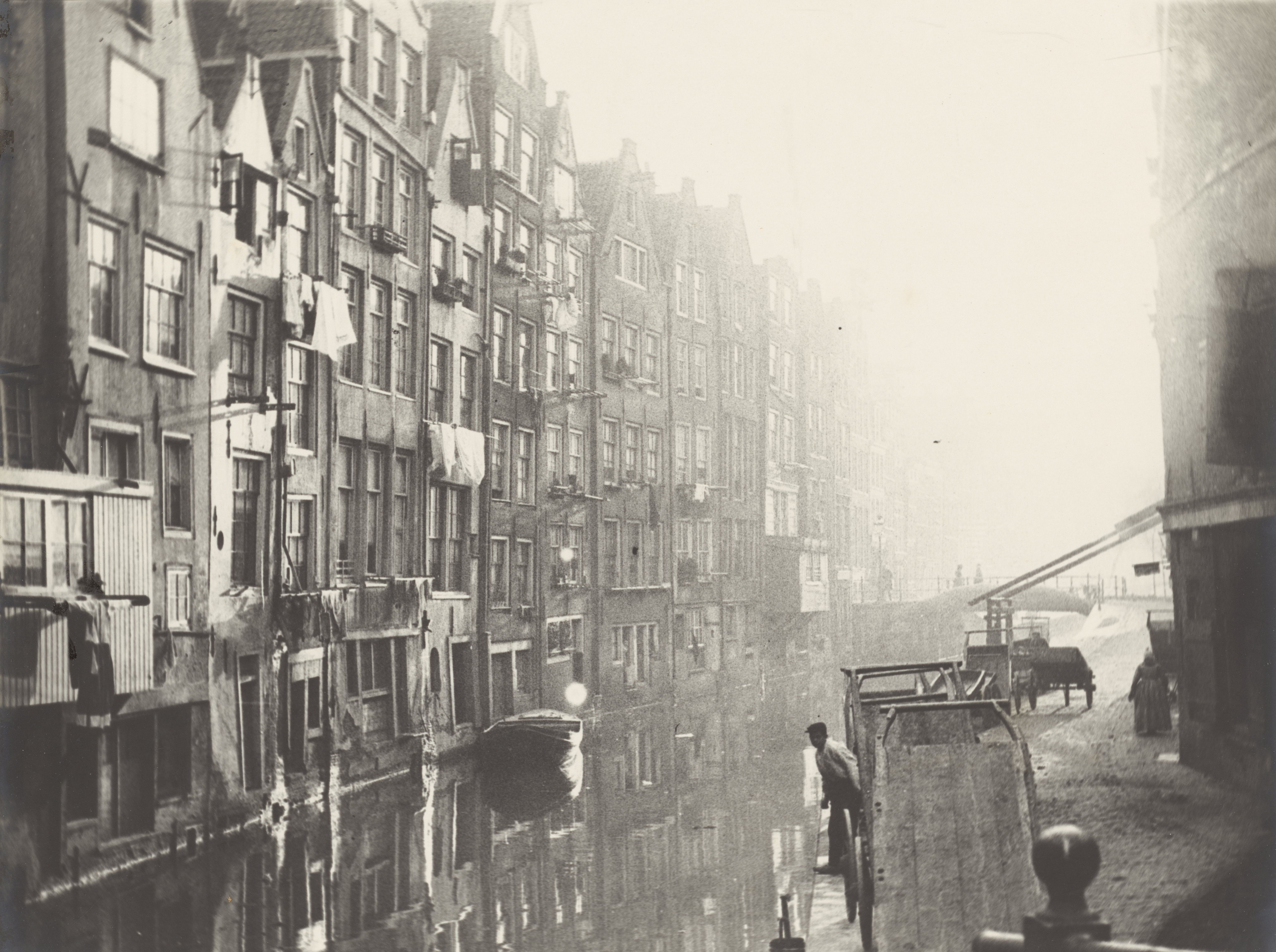 Het Kolkje en de Oudezijds Achterburgwal in Amsterdam, George Hendrik Breitner - George Hendrik Breitner, Photograph, 30 cm × 35 cm